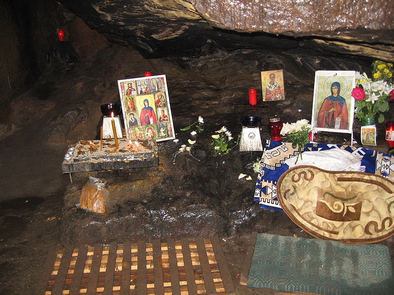 Cueva donde vivió Santa Teodora en Sihla, Rumania